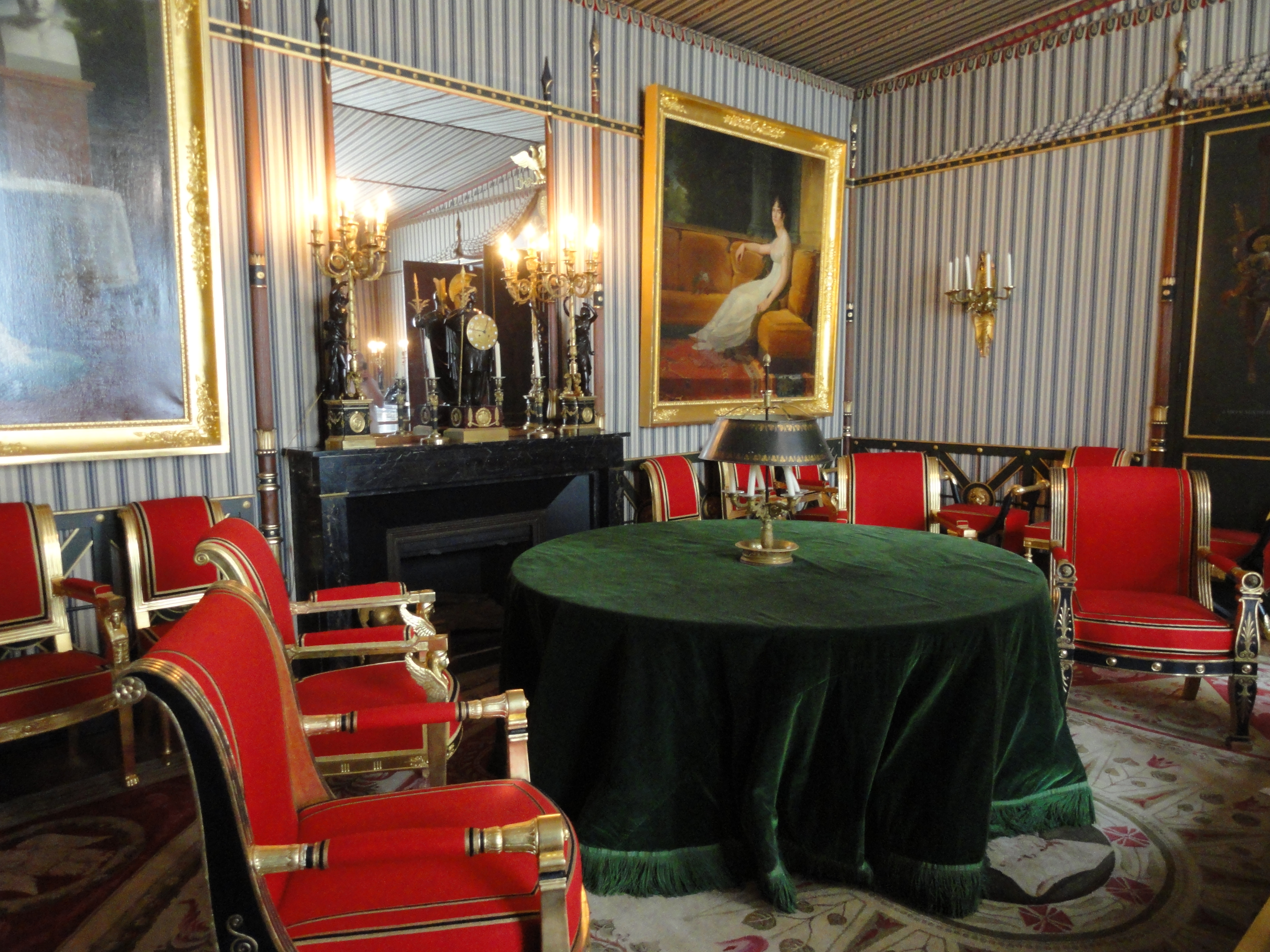 Salle du conseil, château de Malmaison